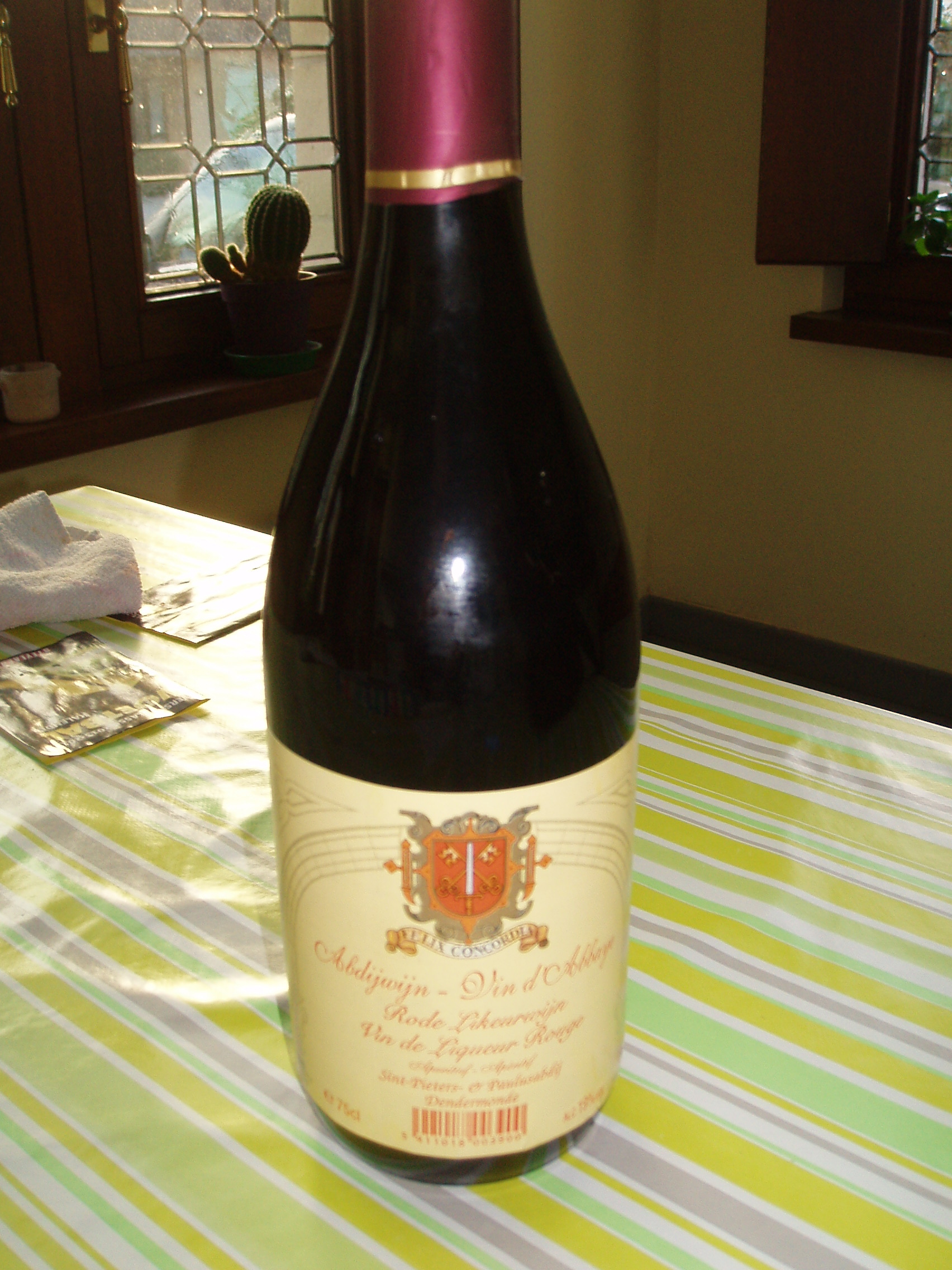 Abdijwijn Rode likeurwijn Sint-Pieter en Paulusabdij Dendermonde